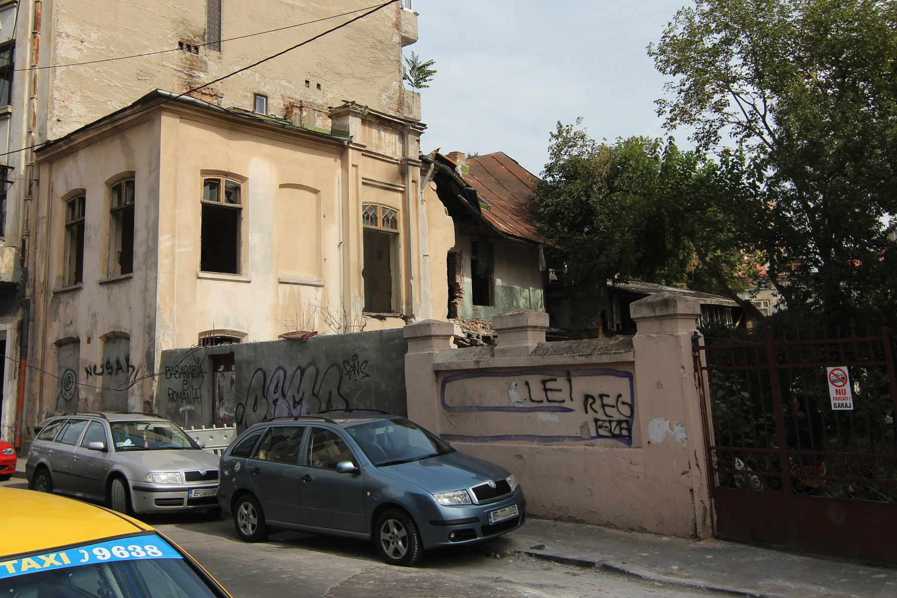 Casă pe Radu Calomfirescu